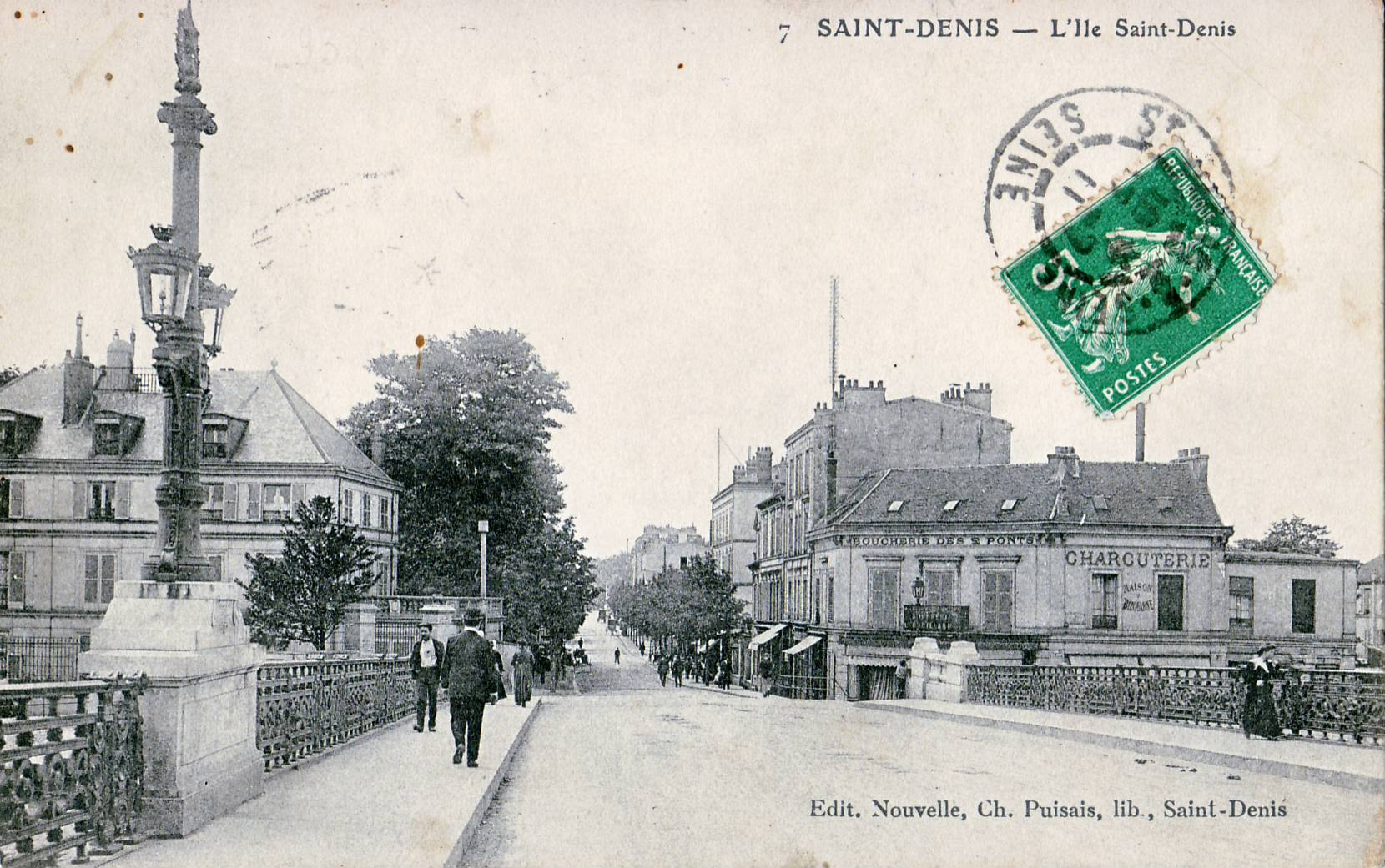 Carte postale ancienne éditée par Puisais à Saint-Denis, n°7 SAINT-DENIS - L'Île-SAINT-DENIS